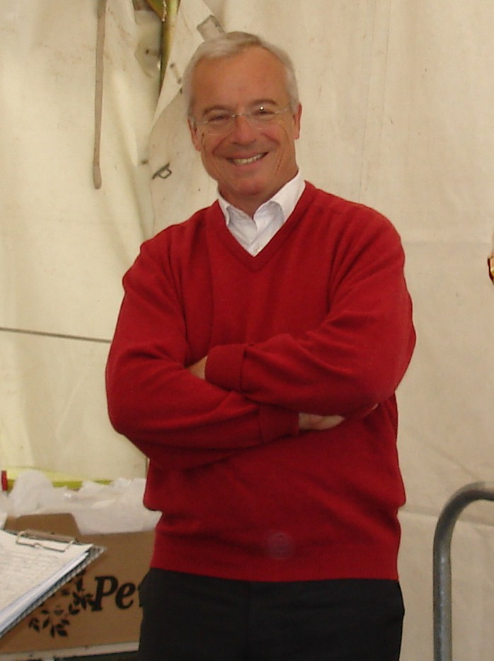 Charles de La Verpillière à Arbent (Ain, France) en août 2010